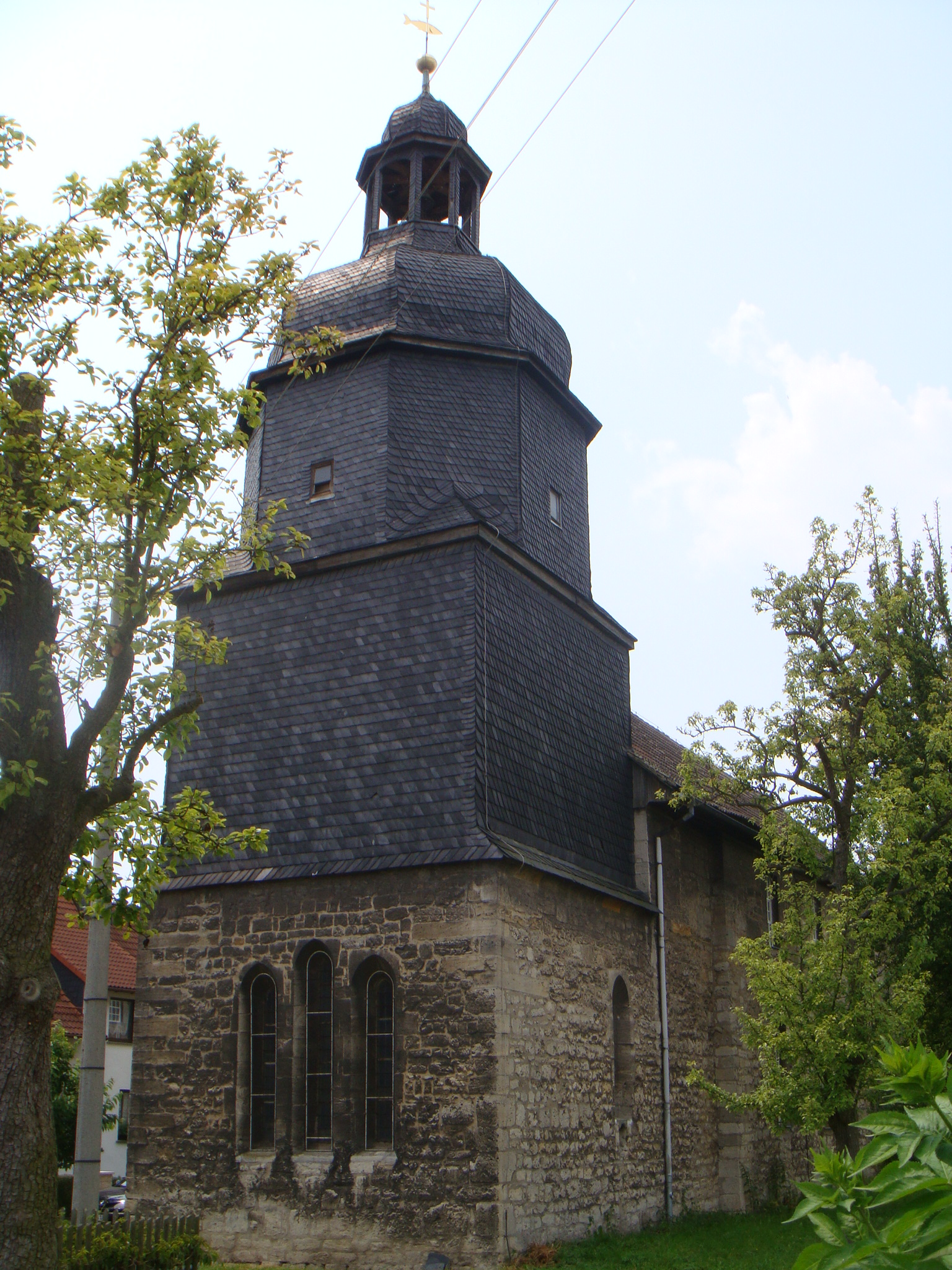 Dorfkirche Turmseite, 2010